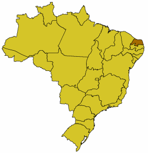 Karte Brasiliens, Rio Grande do Norte hervorgehoben, GFDL nach der Vorlage Bild:Brasilien Bundesstaaten.png